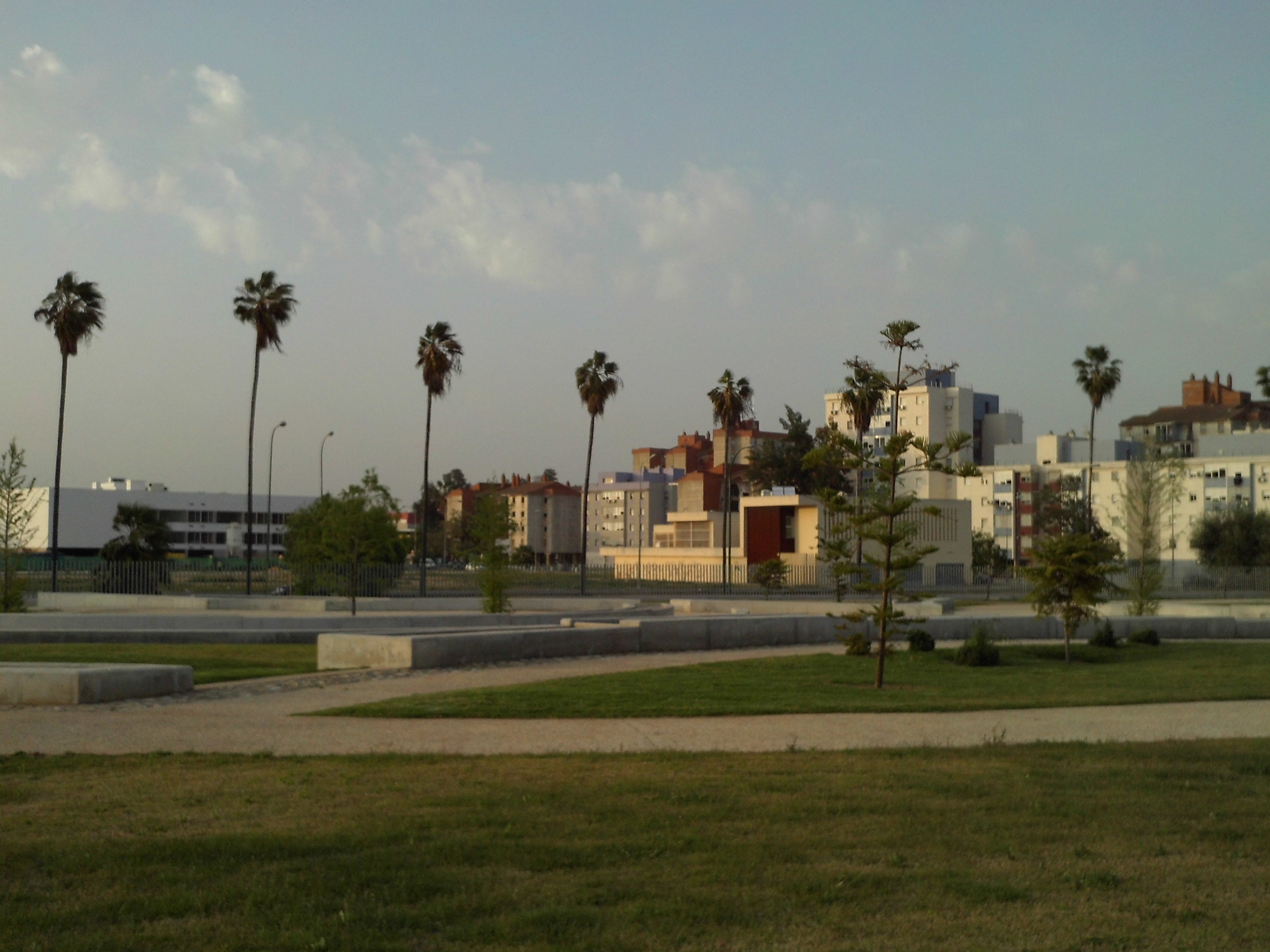 Bancos de homigón en el parque del antiguo cauce del Guadaíra